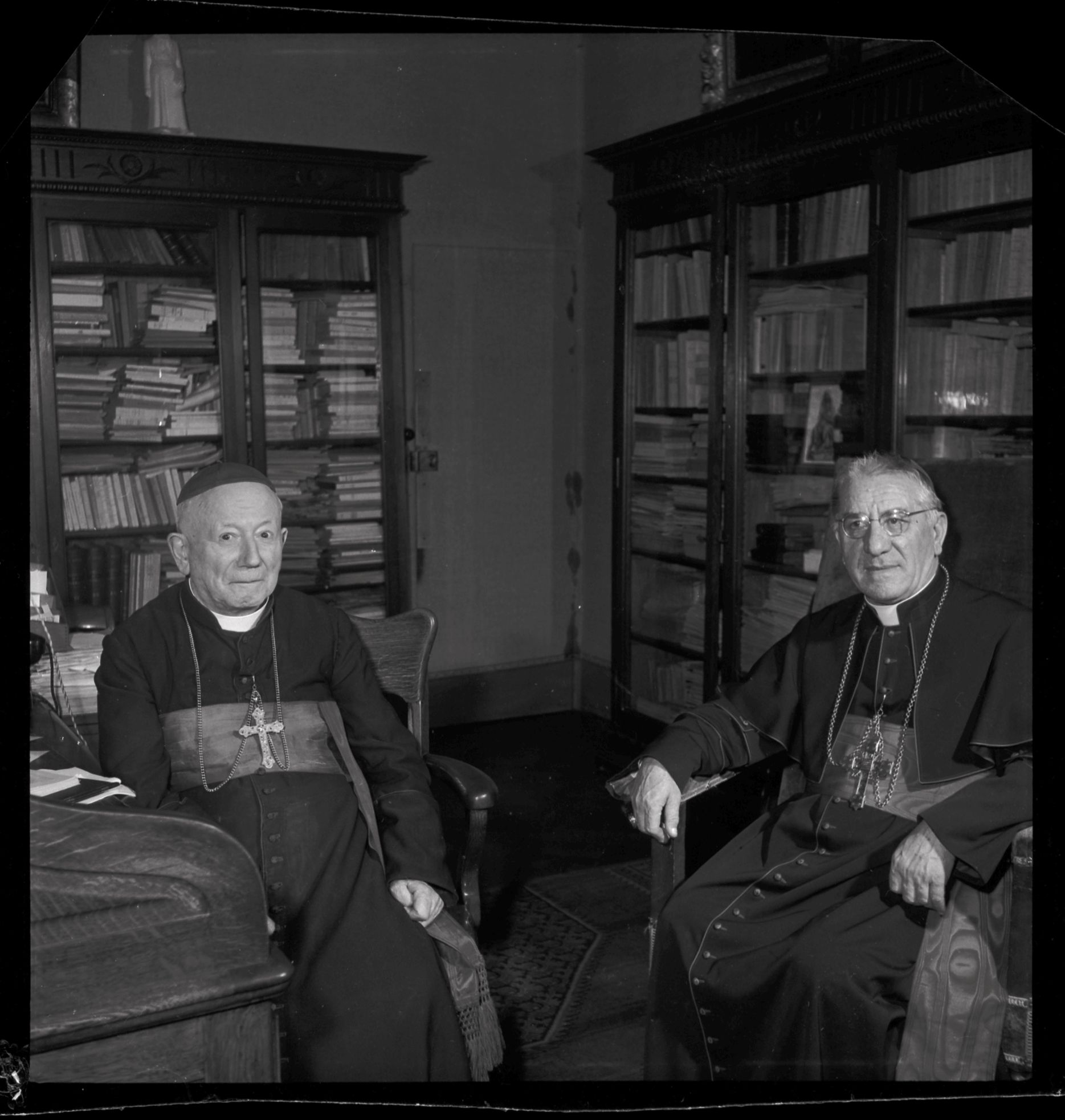 Pas de lieu. Septembre 1953. Vue des cardinaux Piazza et Saliège dans une bibliothèque.